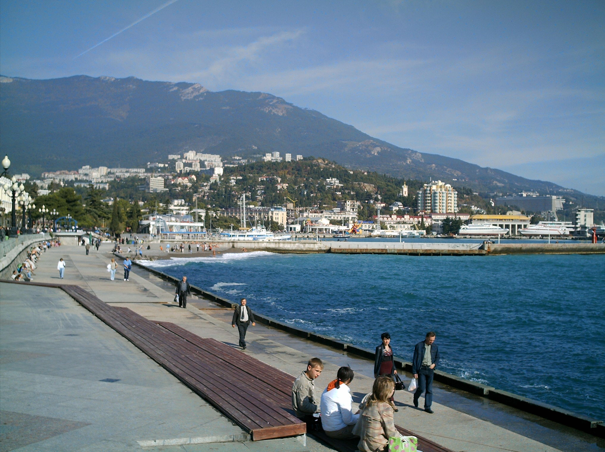 Уголок набережной в Ялте